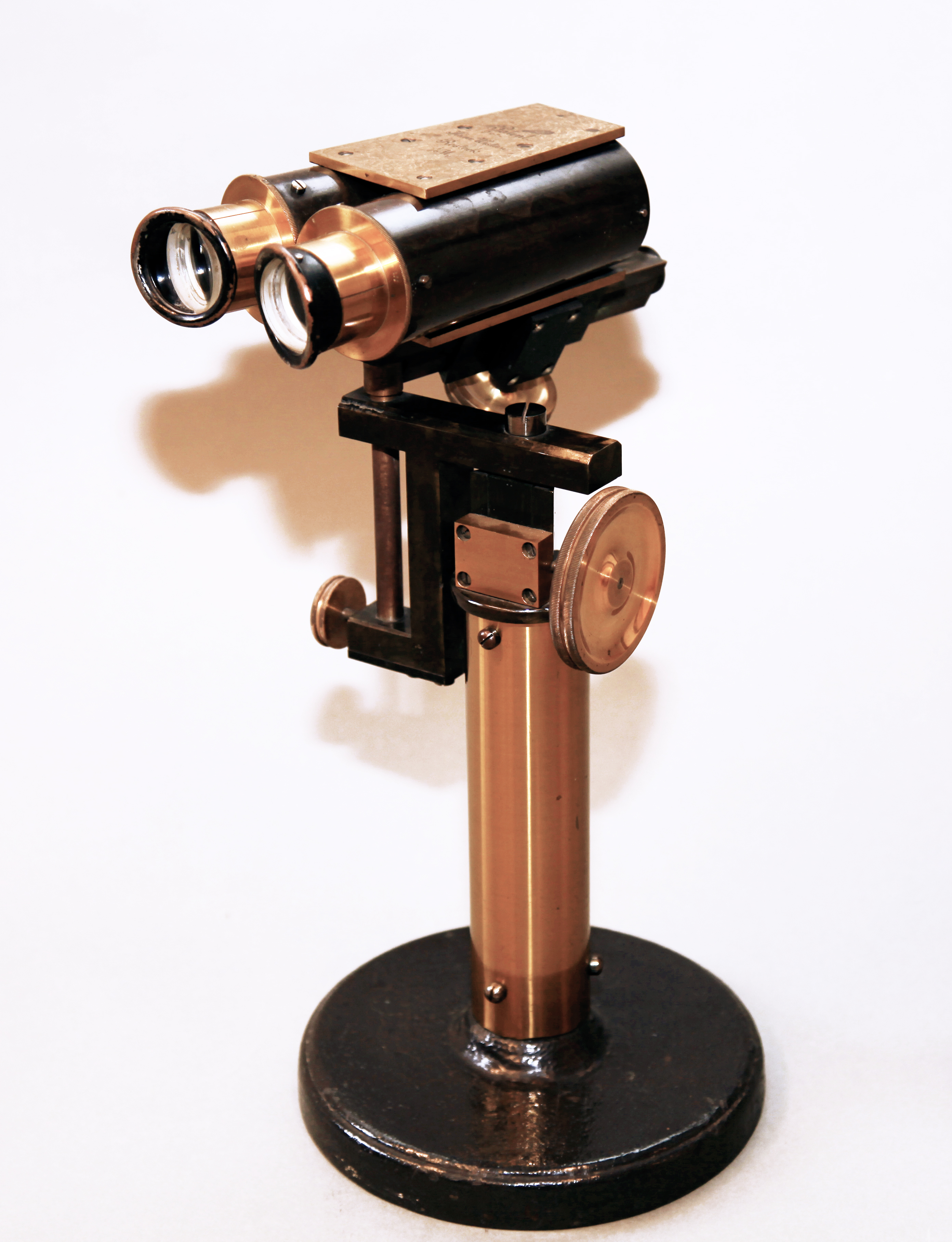 Binoculare Cornealupe, 1886, Fa. Zehender-Westien, Augenärztliche Sammlung, Museum der Universität Tübingen MUT